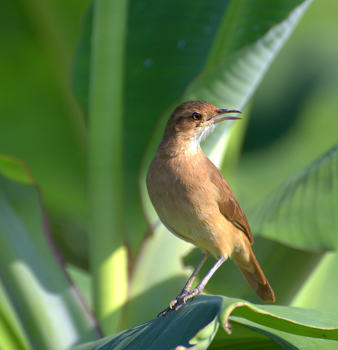 Margem do rio Ribeira de Iguape próximo à cidade de Registro-SP